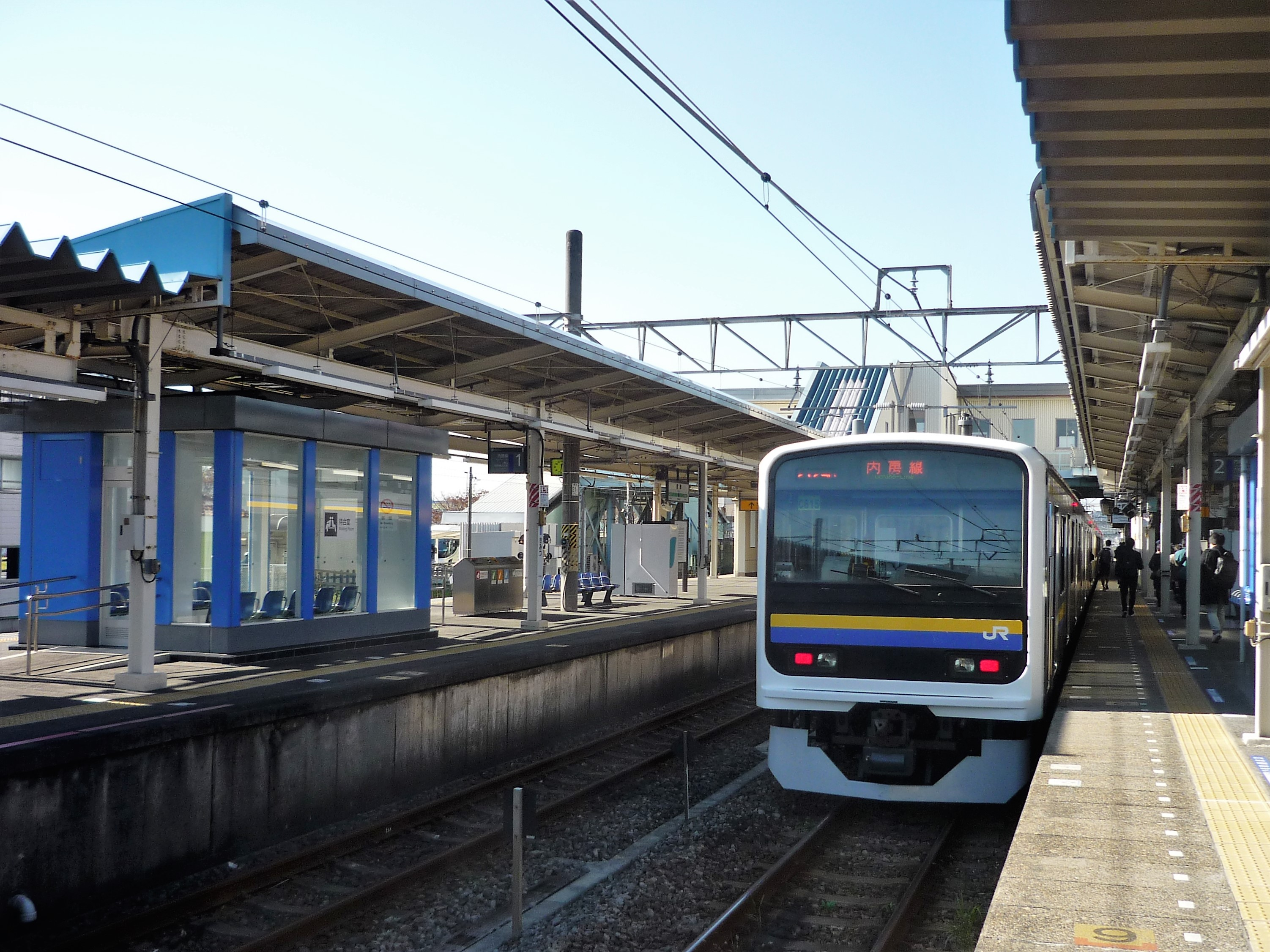 君津駅2番線に停車中の209系 Panasonic Lumix DMC-FS3